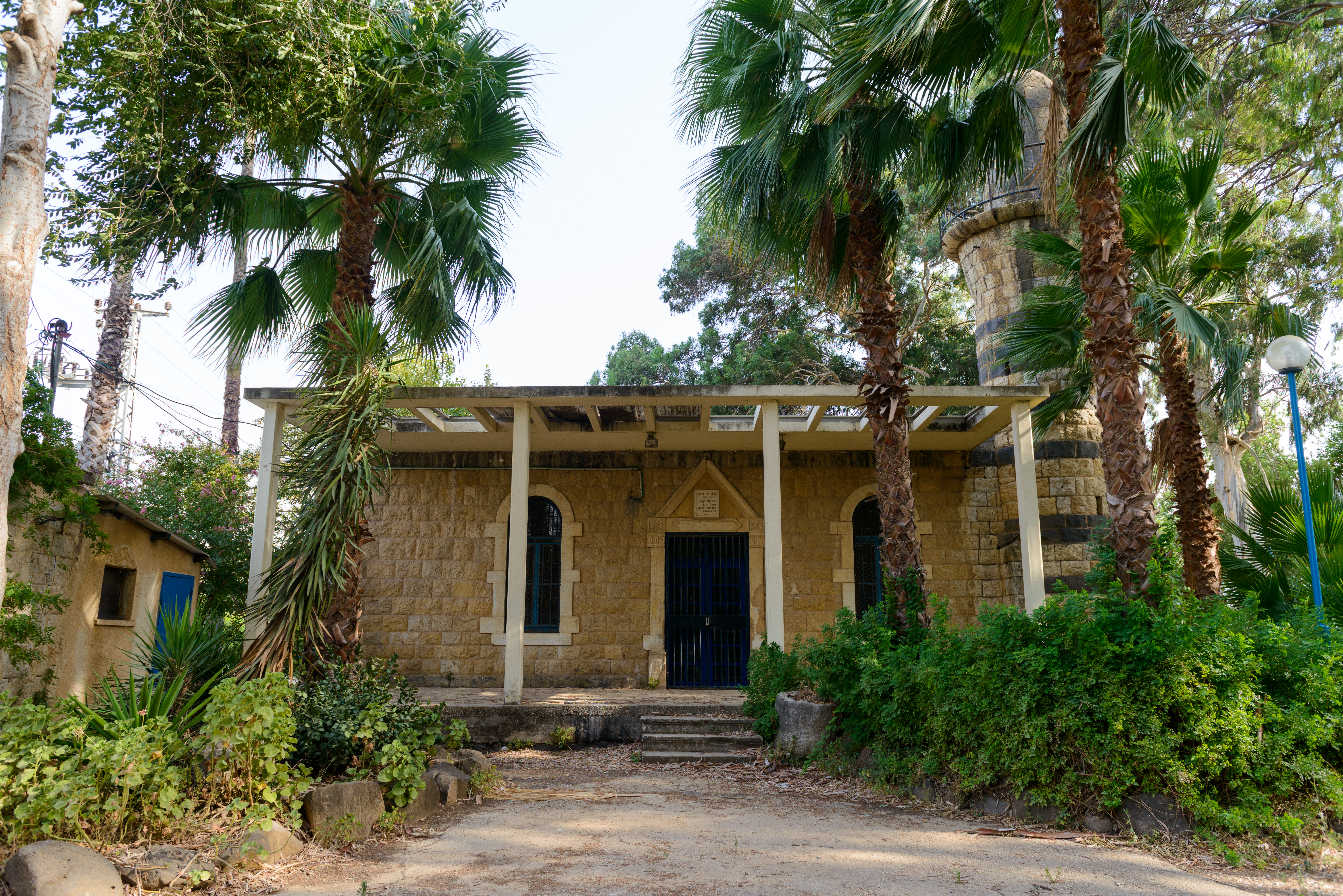 מסגד קריית שמונה, חזית המבנה